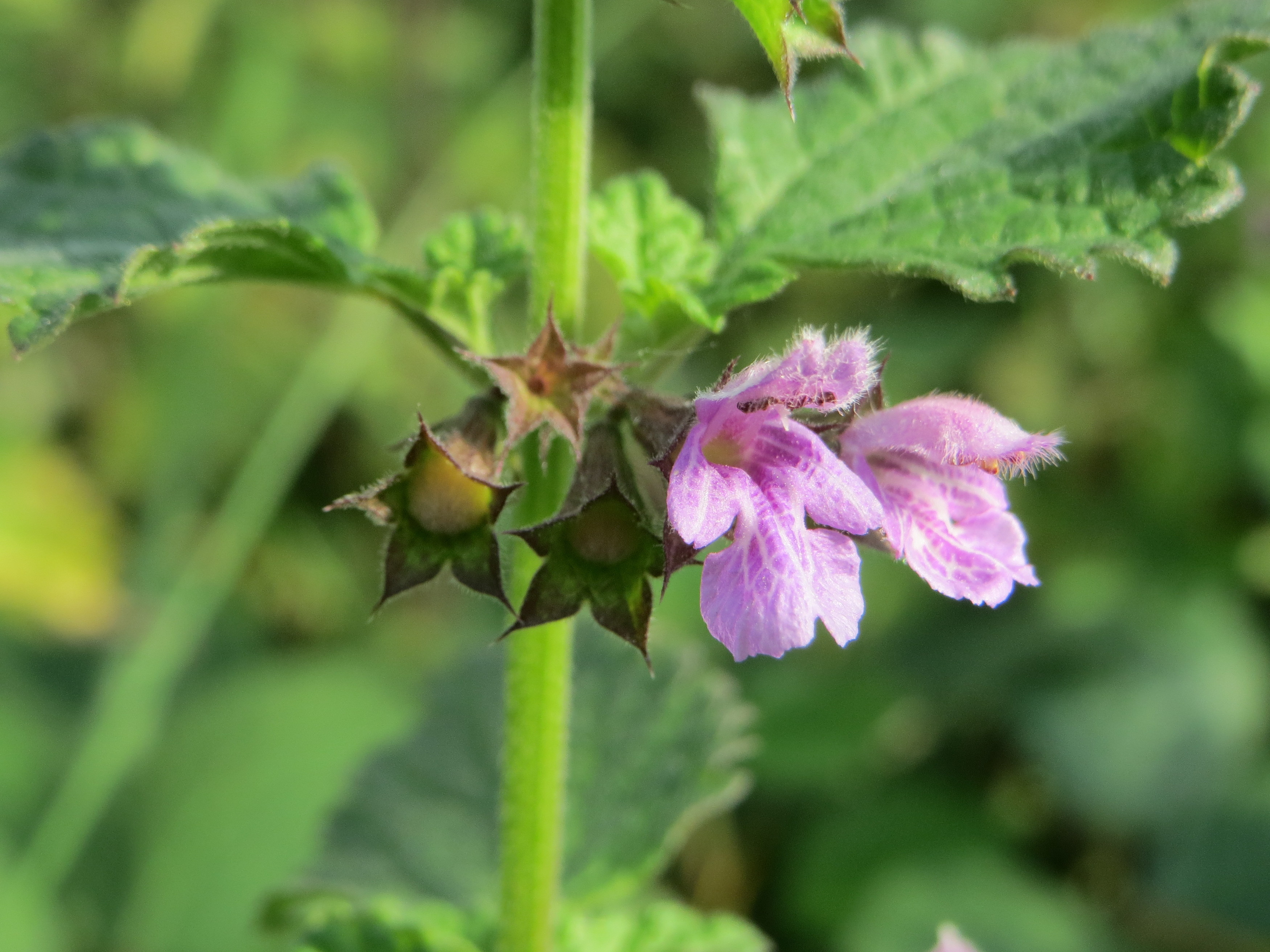 Schwarznessel (Ballota nigra) im Naturschutzgebiet Wagbachniederung